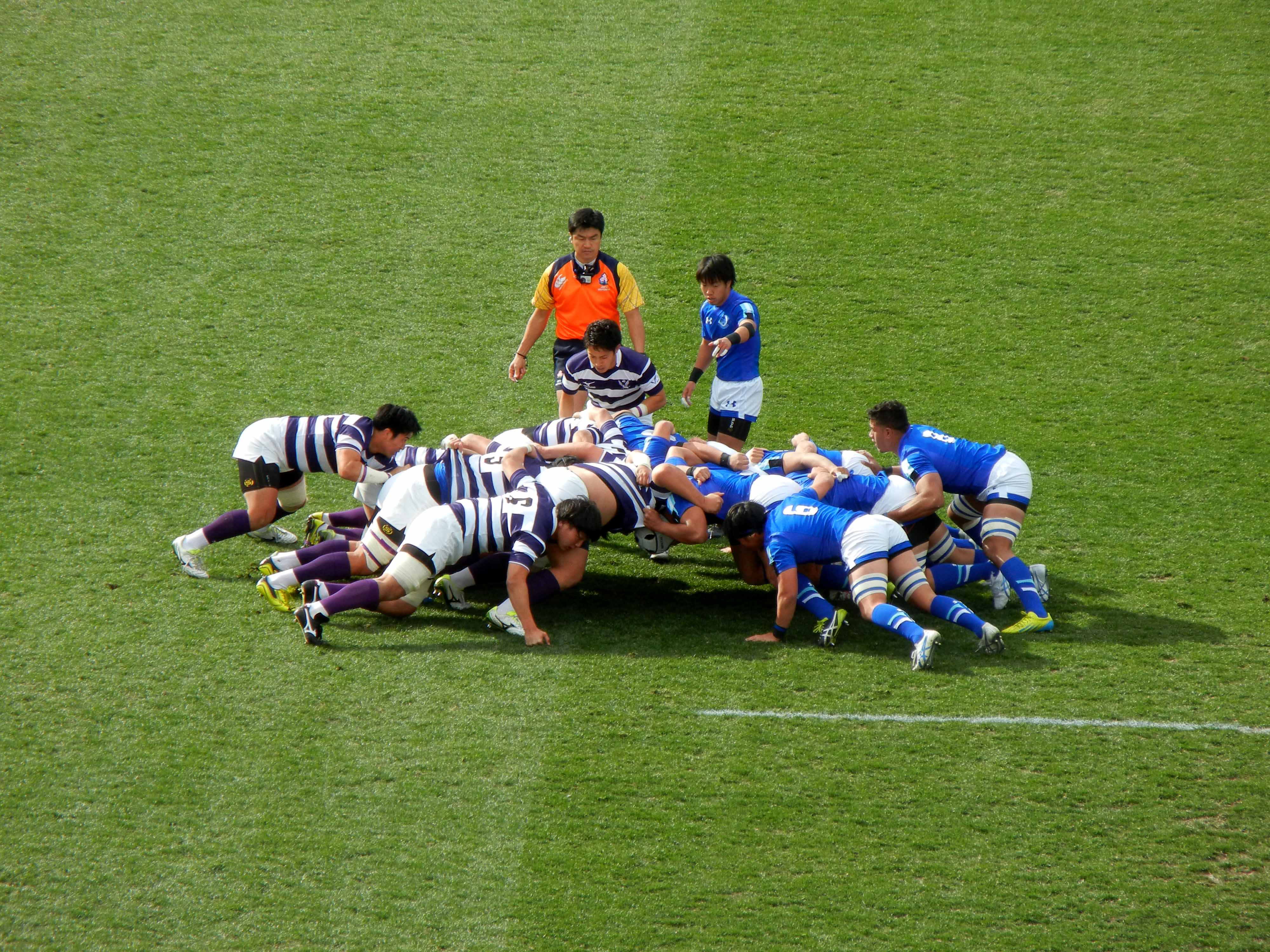 第52回ラグビー大学選手権準決勝 東海大学対明治大学